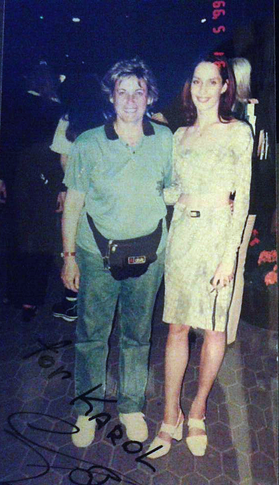 La fotógrafa española Karol Otero junto a la gimnasta ucraniana Elena Vitrichenko tras la celebración del Campeonato Europeo de Budapest en 1999.